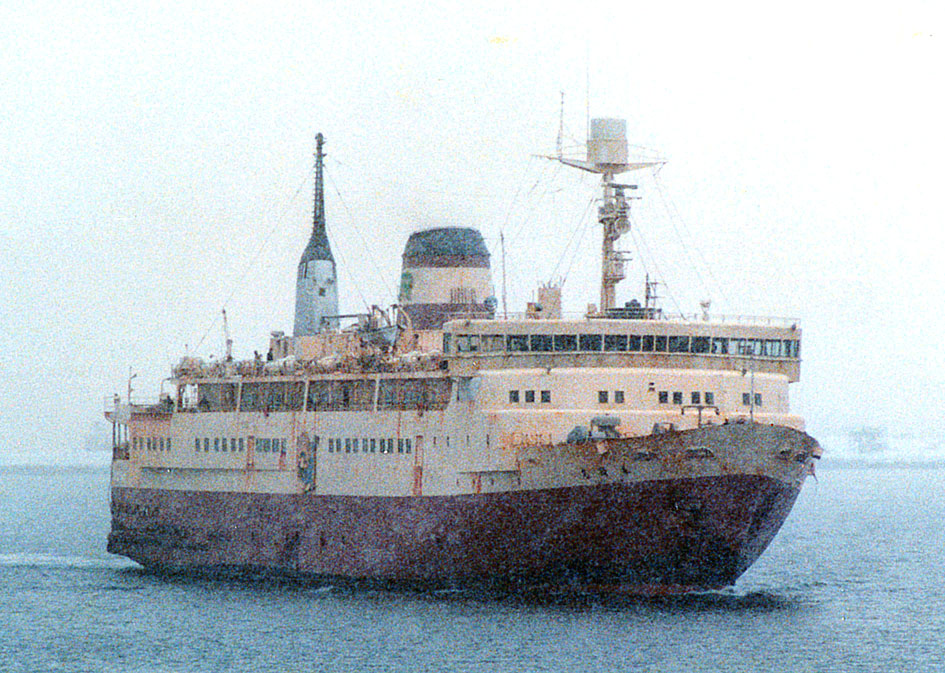 JR北海道 青函連絡船 羊蹄丸